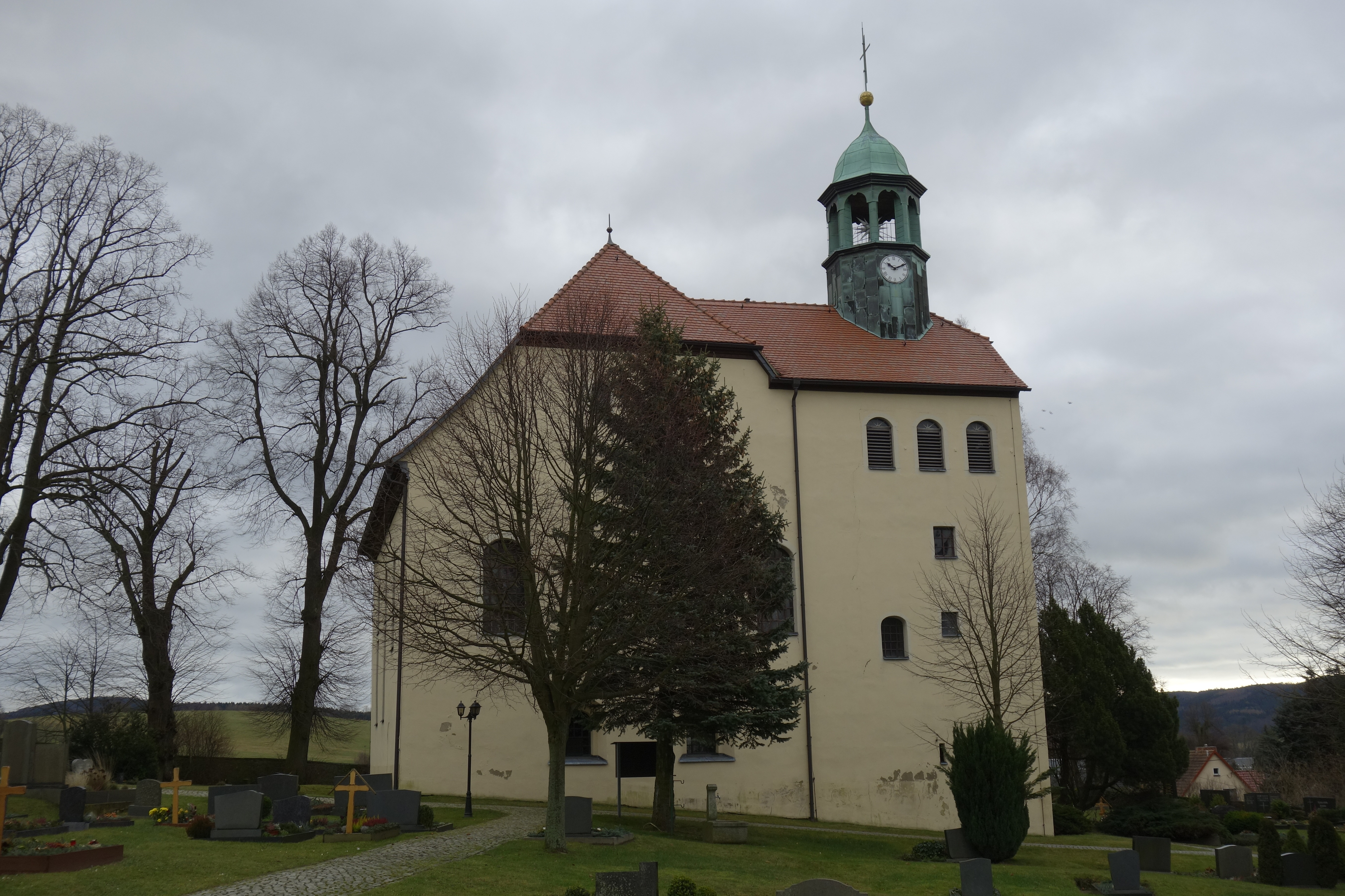 Kirche Oberottendorf Januar 2018 (1)